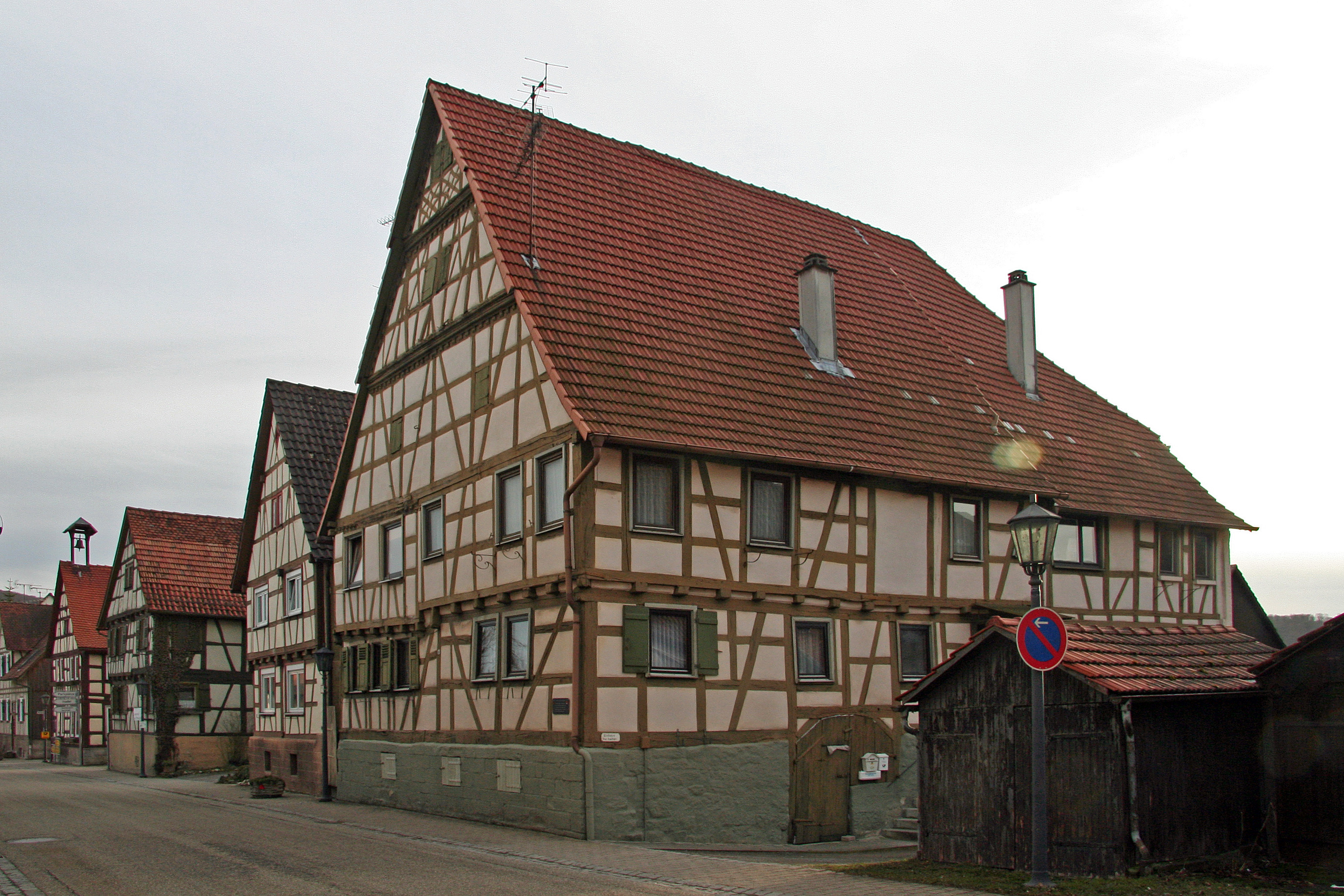 Ehemalige Zehntscheuer in Ochsenbach.